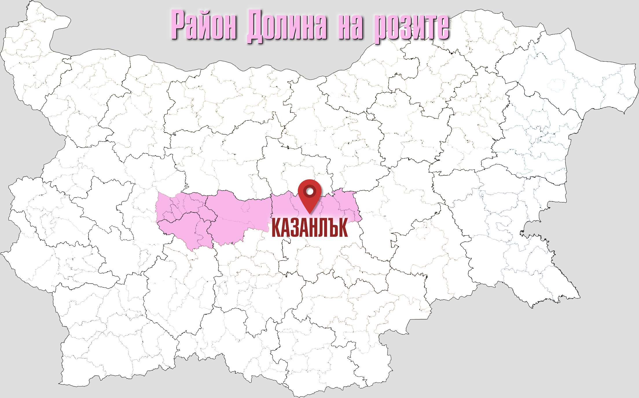 Район "Долината на розите"